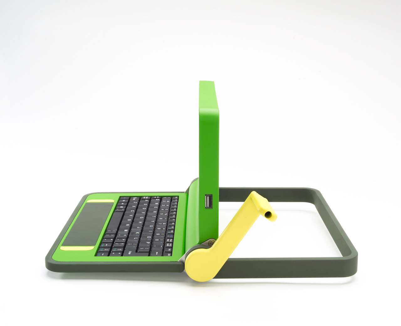 $100 Laptop prototype